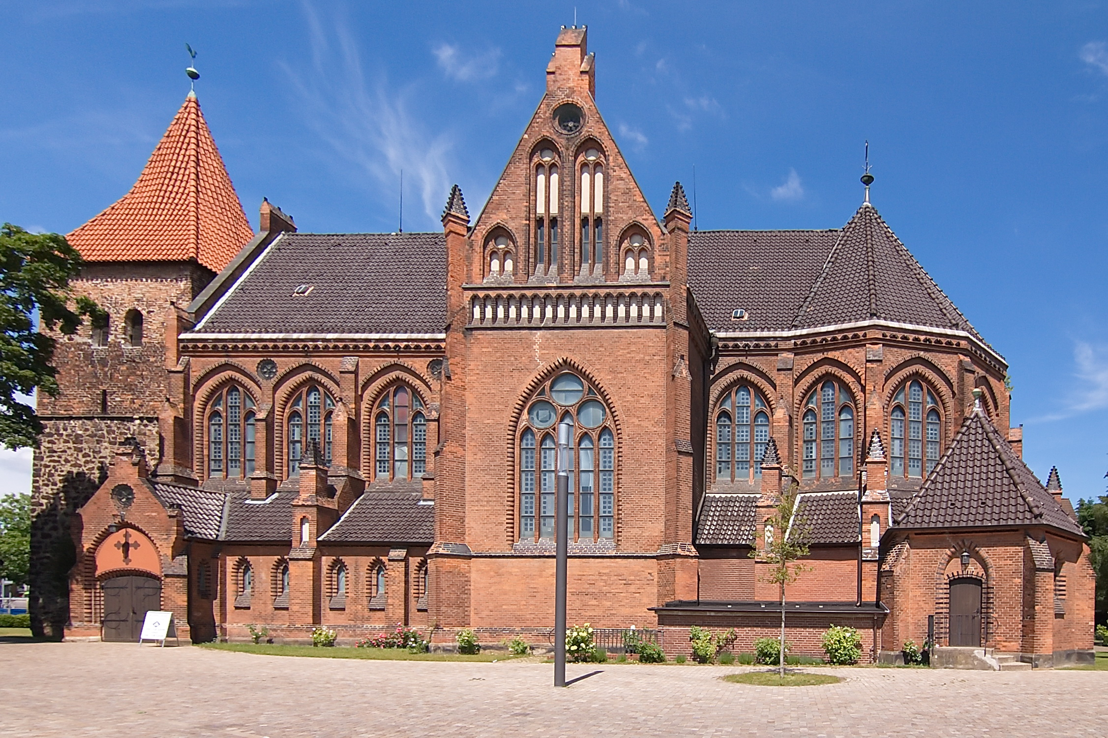 Elisabethkirche von 1867 in Langenhagen mit spätmittelalterlichem Westturm